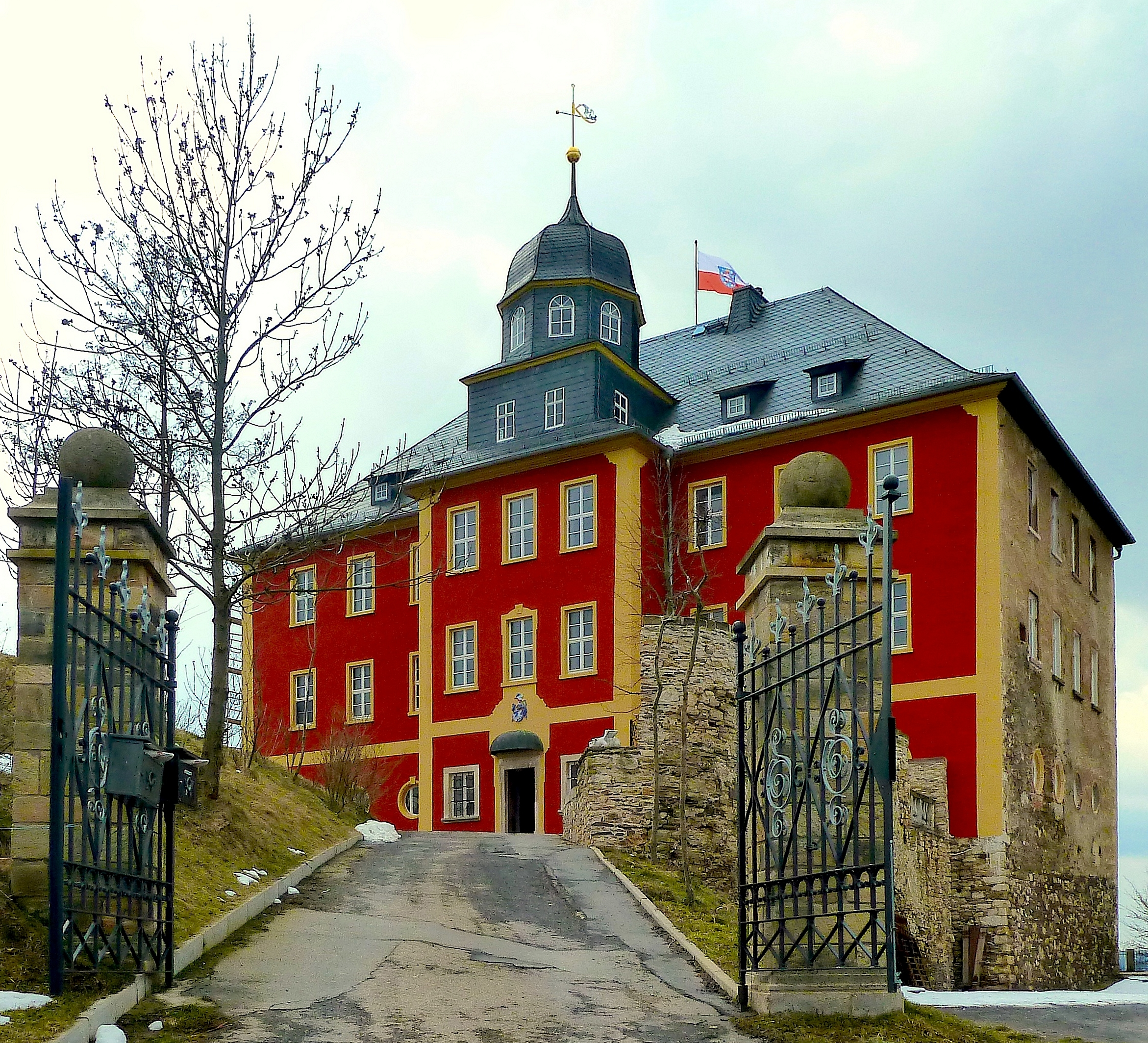 Schloss Brandenstein: Frontansicht im April 2013